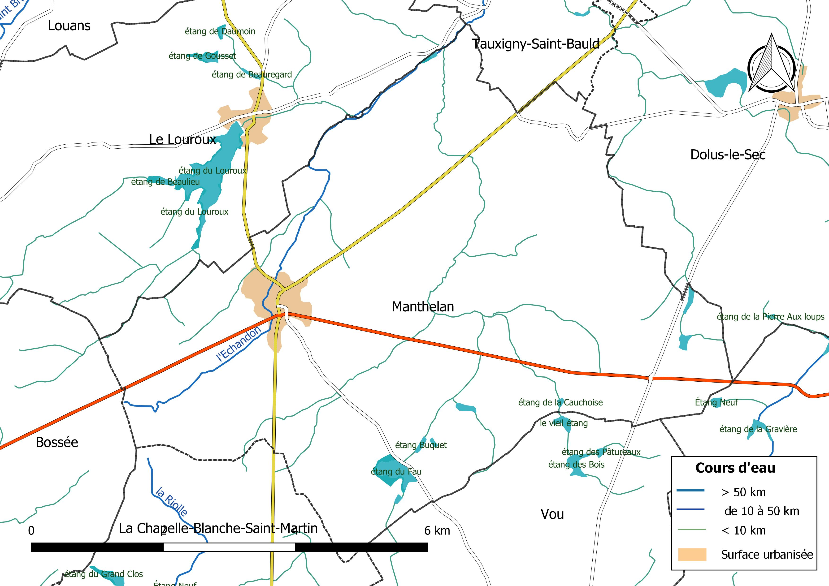 Carte du réseau hydrographique de la commune de Manthelan (France).